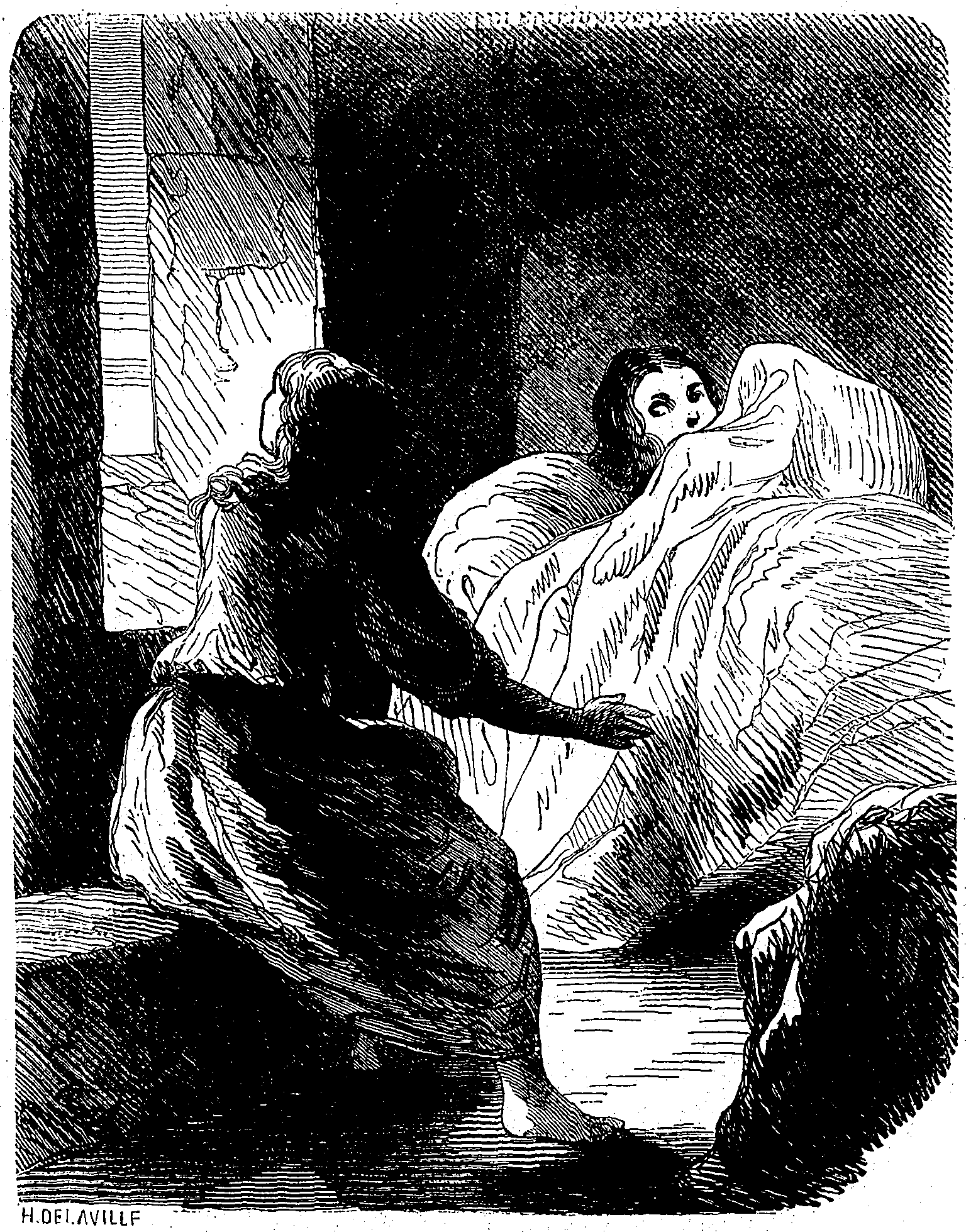 Jeanne et Claudie inquiétés par des bruits nocturnes, au chapitre XV. Dessin en noir et blanc de Tony Johannot (gravure de A. Delaville) pour les Œuvres illustrées de George Sand, Jeanne, Paris, Jules Hetzel éditeur, volume 3, 1853.